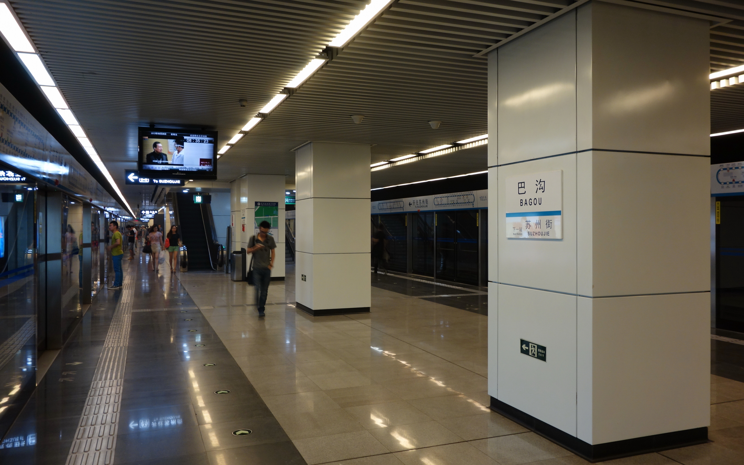 巴沟站站台